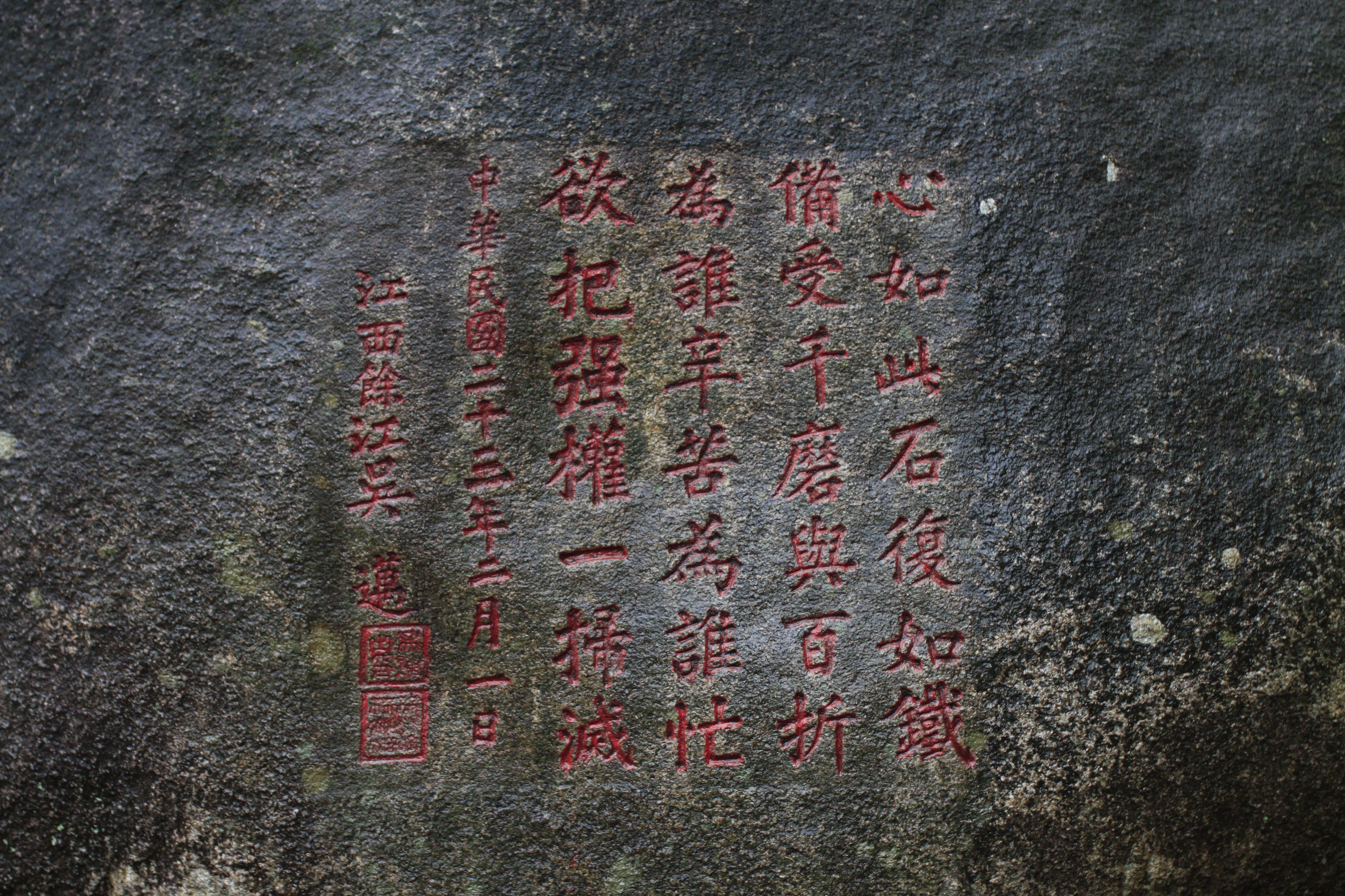 南普陀寺，位于中国福建省厦门市。